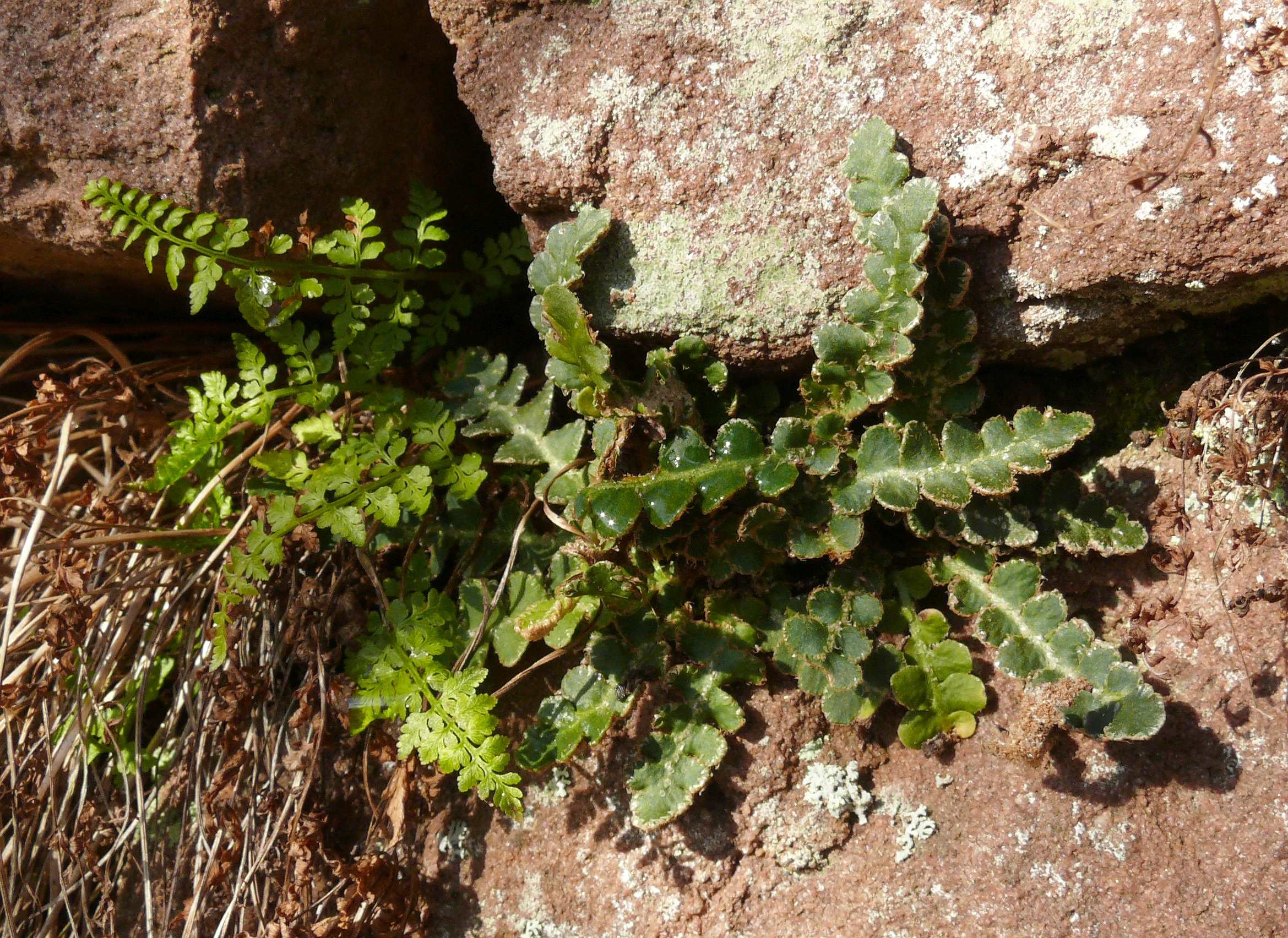 Asplenium adiantum-nigrum & Asplenium ceterach, Spessart, Germany